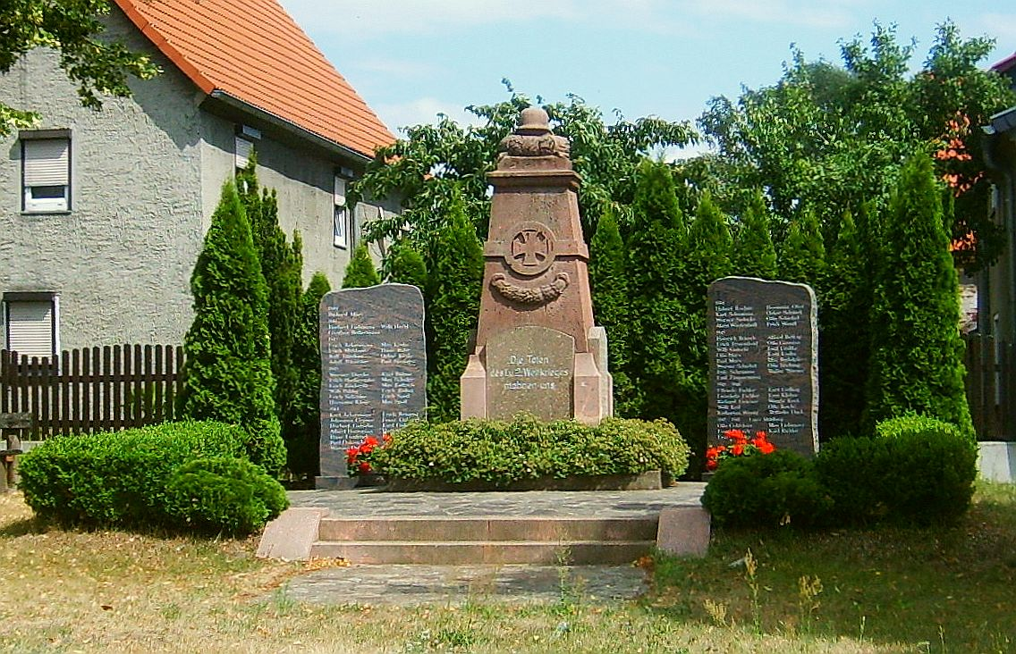 Kriegerdenkmal Pressel